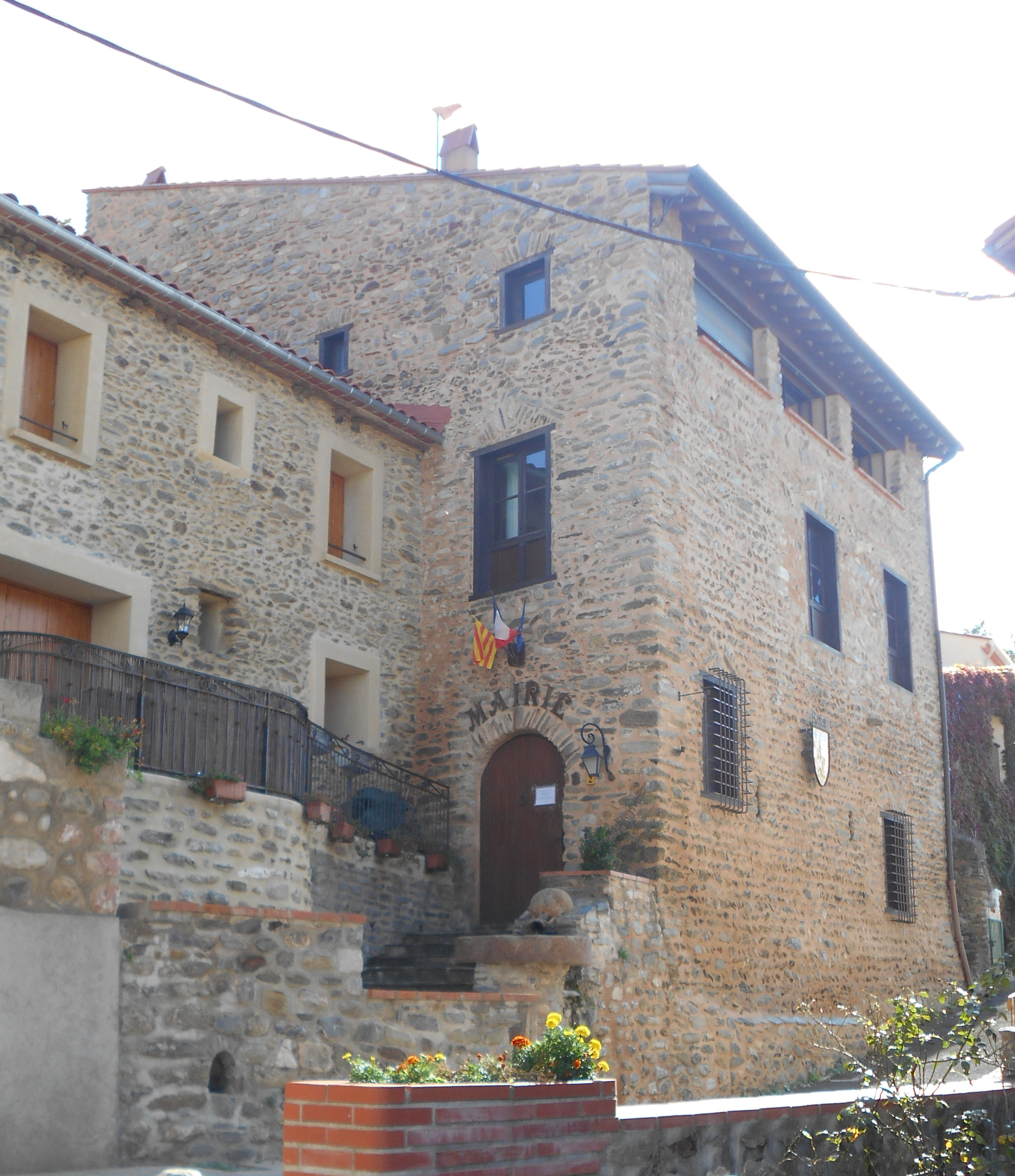 Casa del comú de Jóc, al Conflent